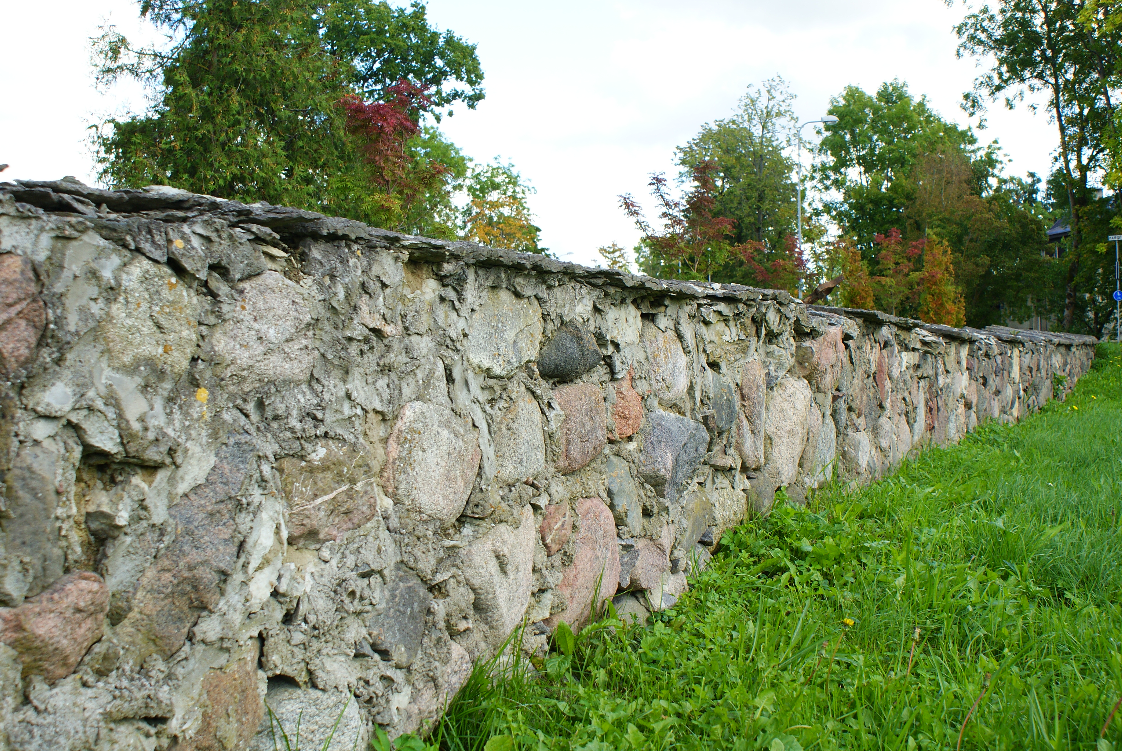 Jüri kirikuaia piirdemüür